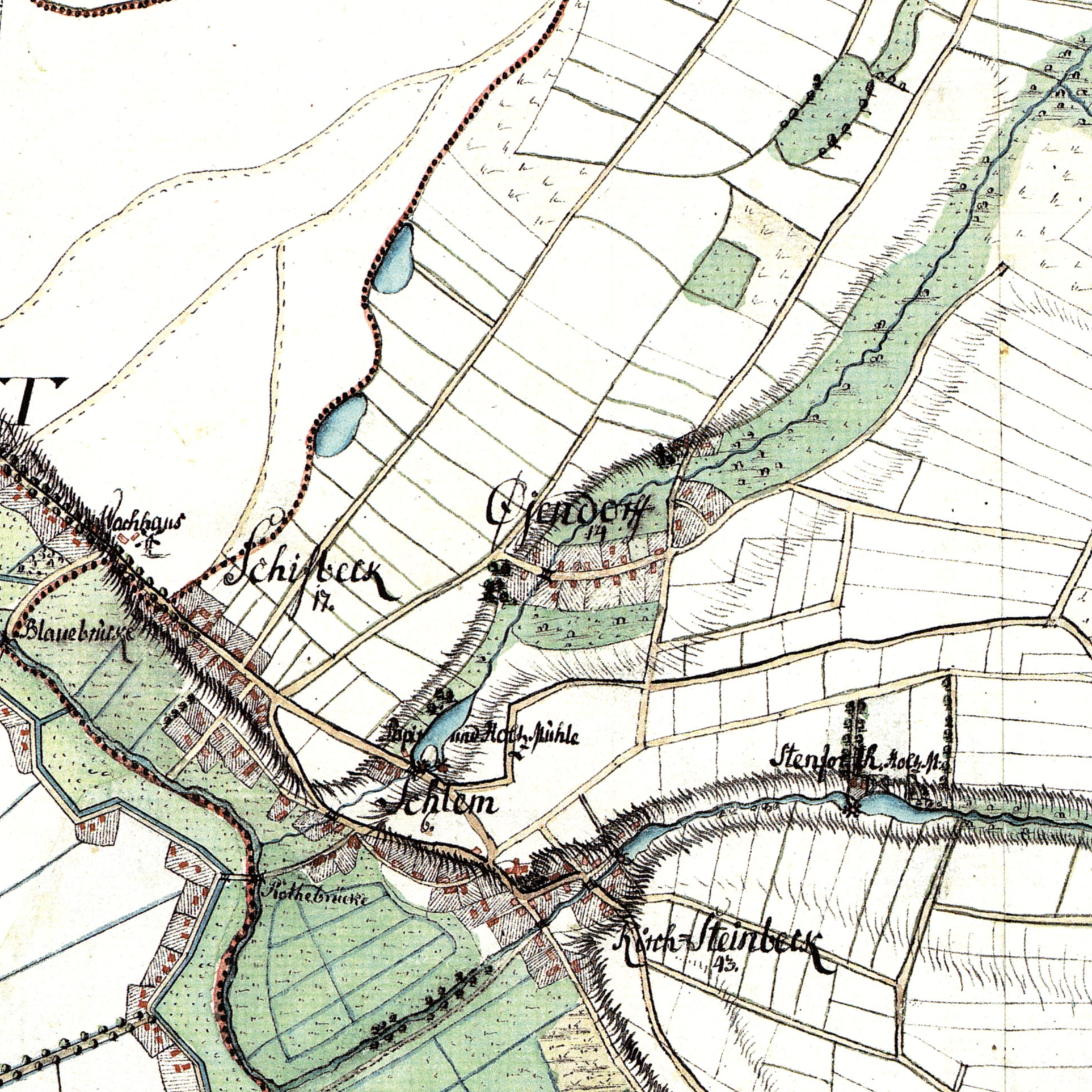 Ausschnitt Billstedt (ehemals: Schifbeck Öjendorff Steinbeck & Schlem) aus Image:Varendorf(63)Bergedorf Reinbek.jpg. Aufgenommen in den Jahren 1789 bis 1796 unter der Direktion des Majors Gustav Adolf von Varendorf durch Offiziere des Schleswigschen Infanterieregiments